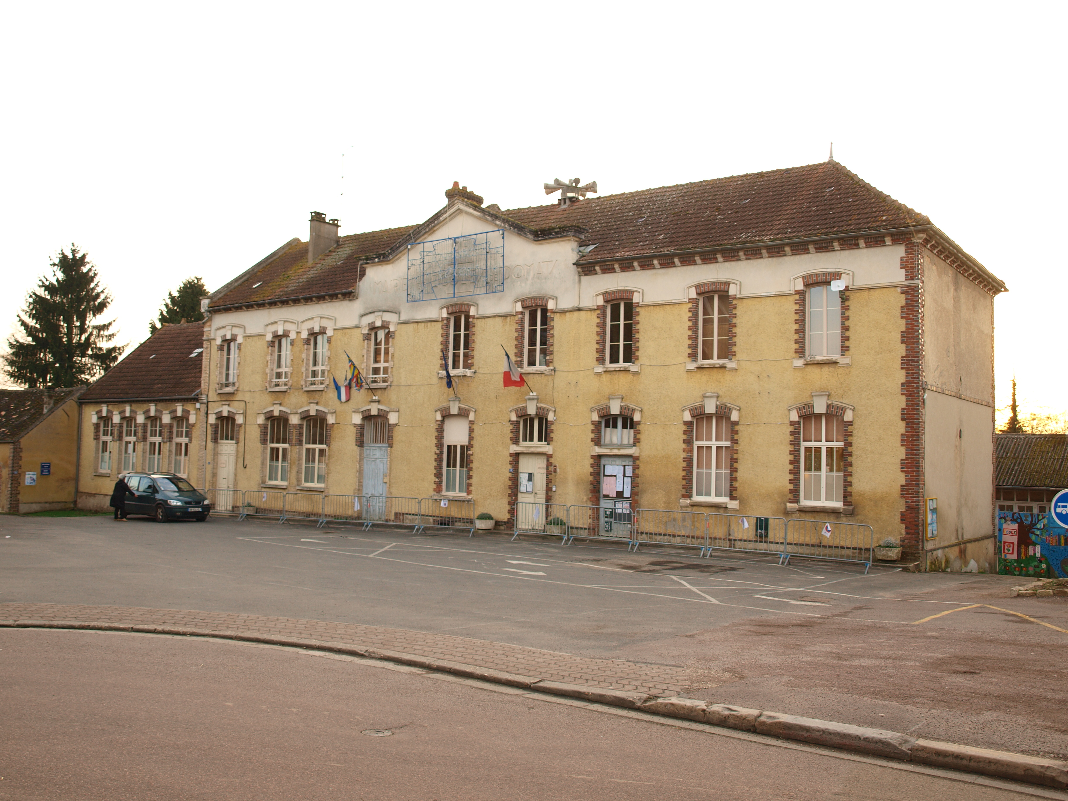 Domats (Yonne, France)